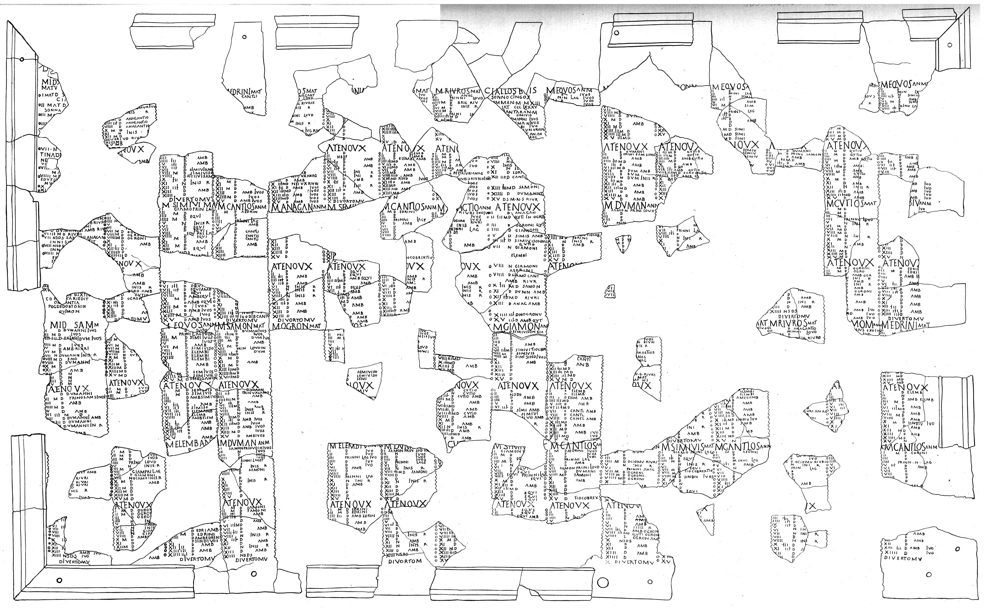 Fac-similé du calendrier de Coligny publié par Seymour de Ricci (1881-1942) en 1926